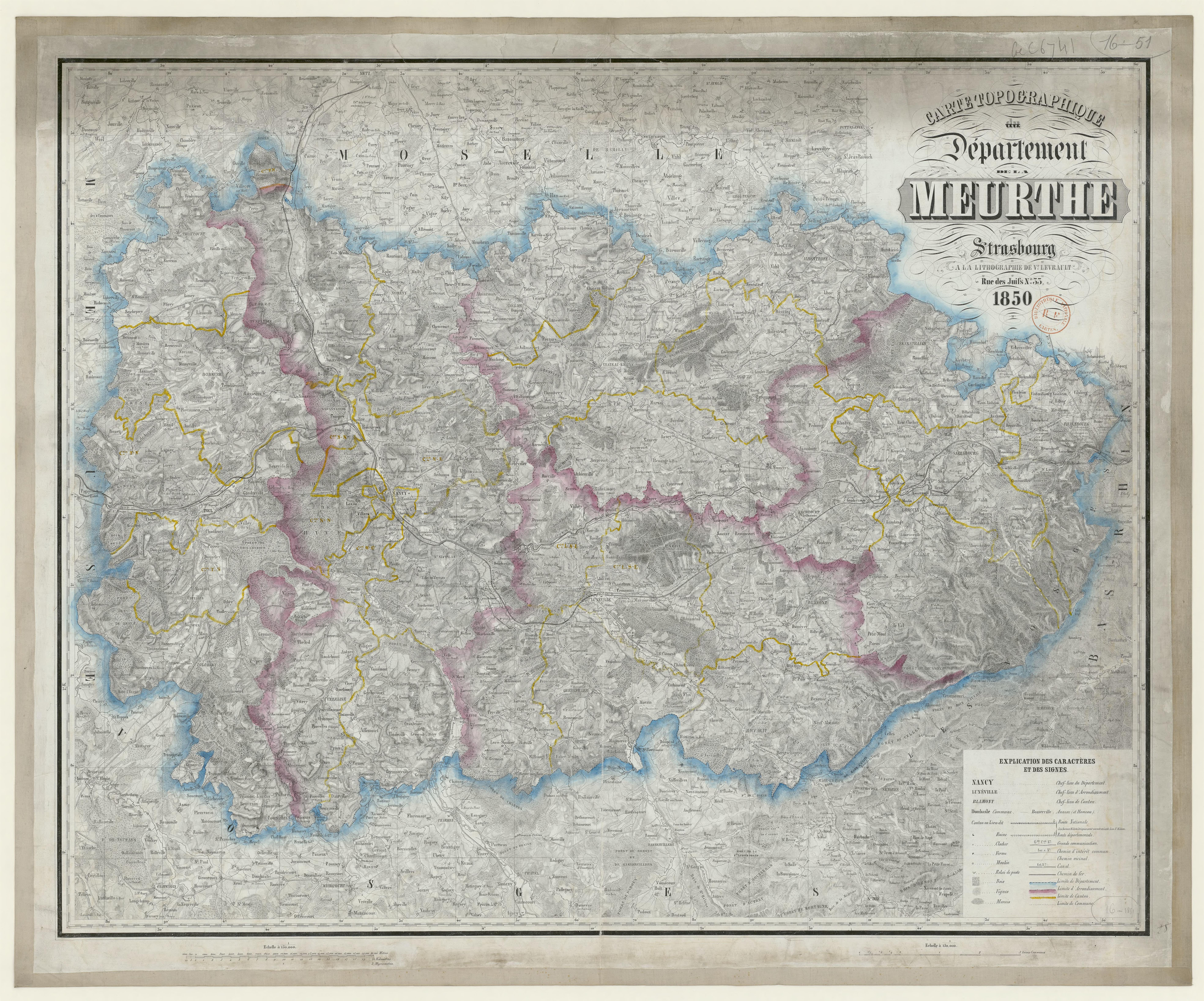 Carte topographique du département de la Meurthe